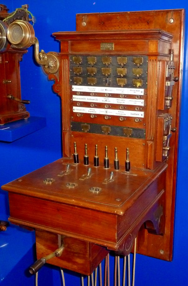 Klappenschrank für die Handvermittlung mit 15 Leitungen ehemaliger Standort war in Dinkelsbuehl